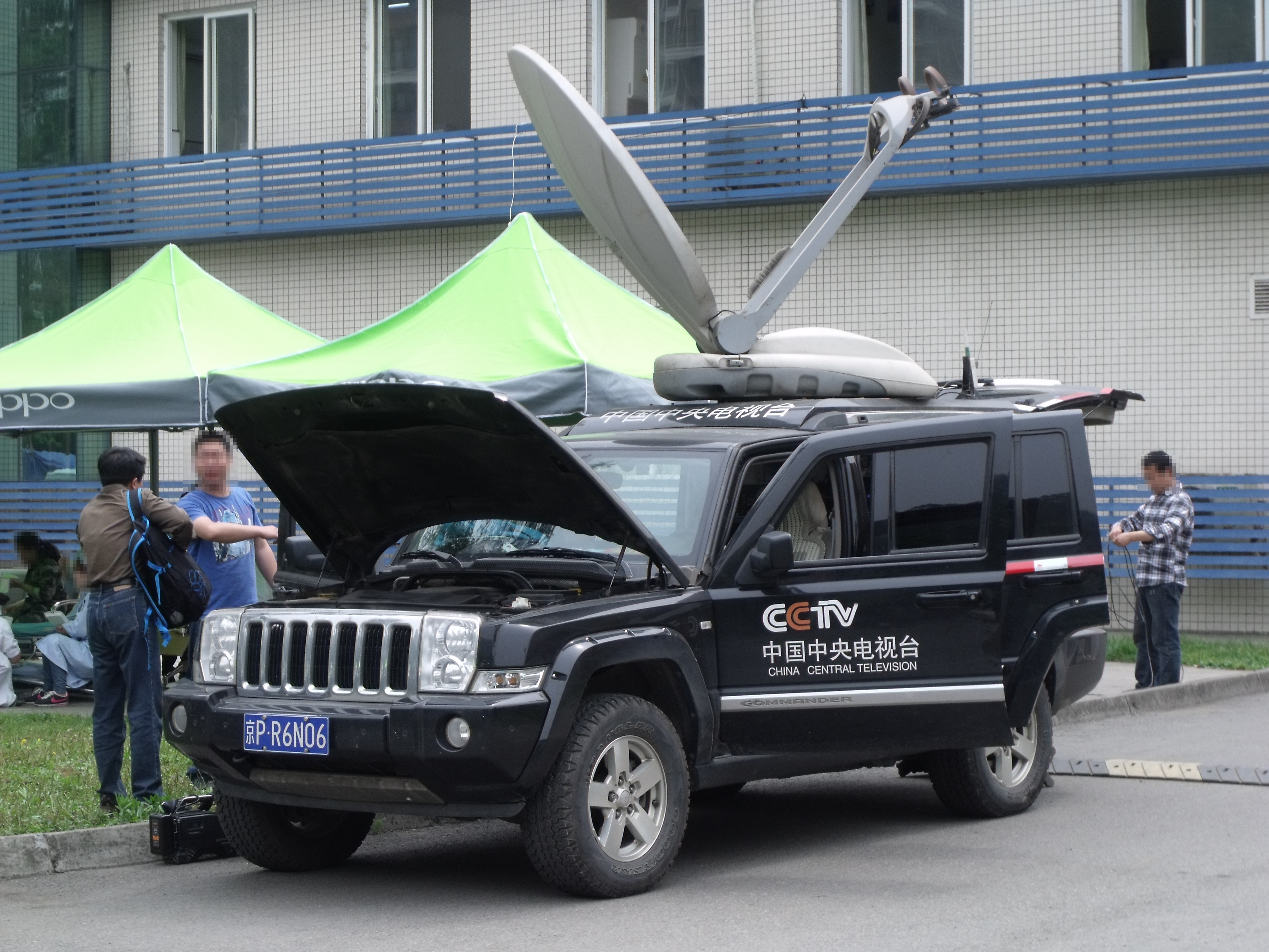 2013 四川雅安地震發生後在當地拍攝到的CCTV新聞車。